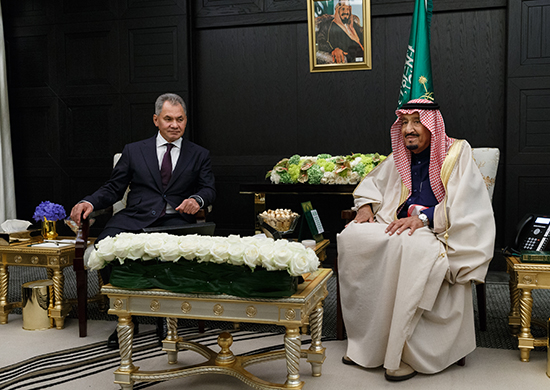 Встреча Короля Саудовской Аравии Сальмана бен Абдель Азиз Аль Сауда с Министром обороны России генералом армии Сергеем Шойгу